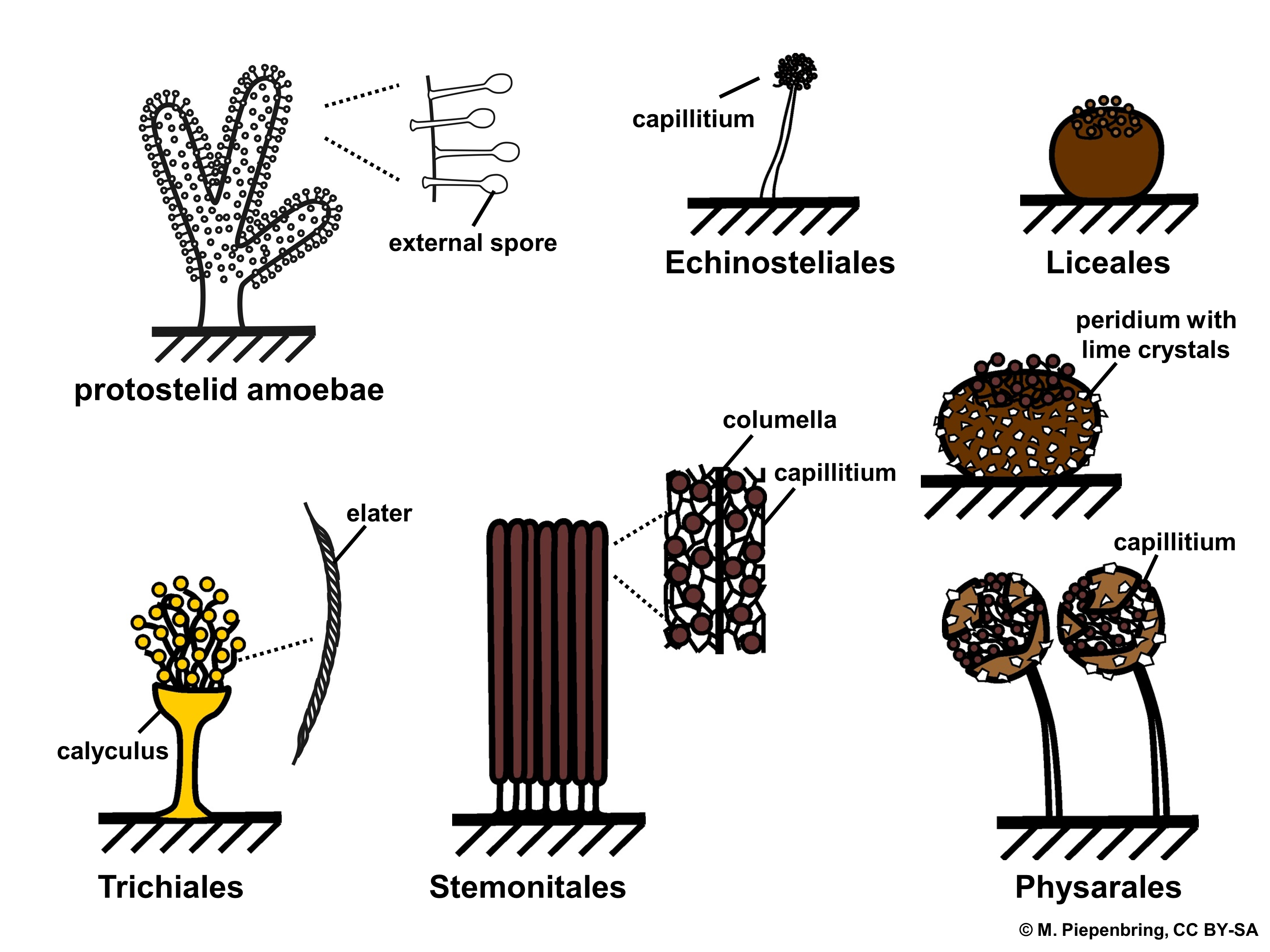 Biologische Schemata, gezeichnet und freigegeben von M. Piepenbring